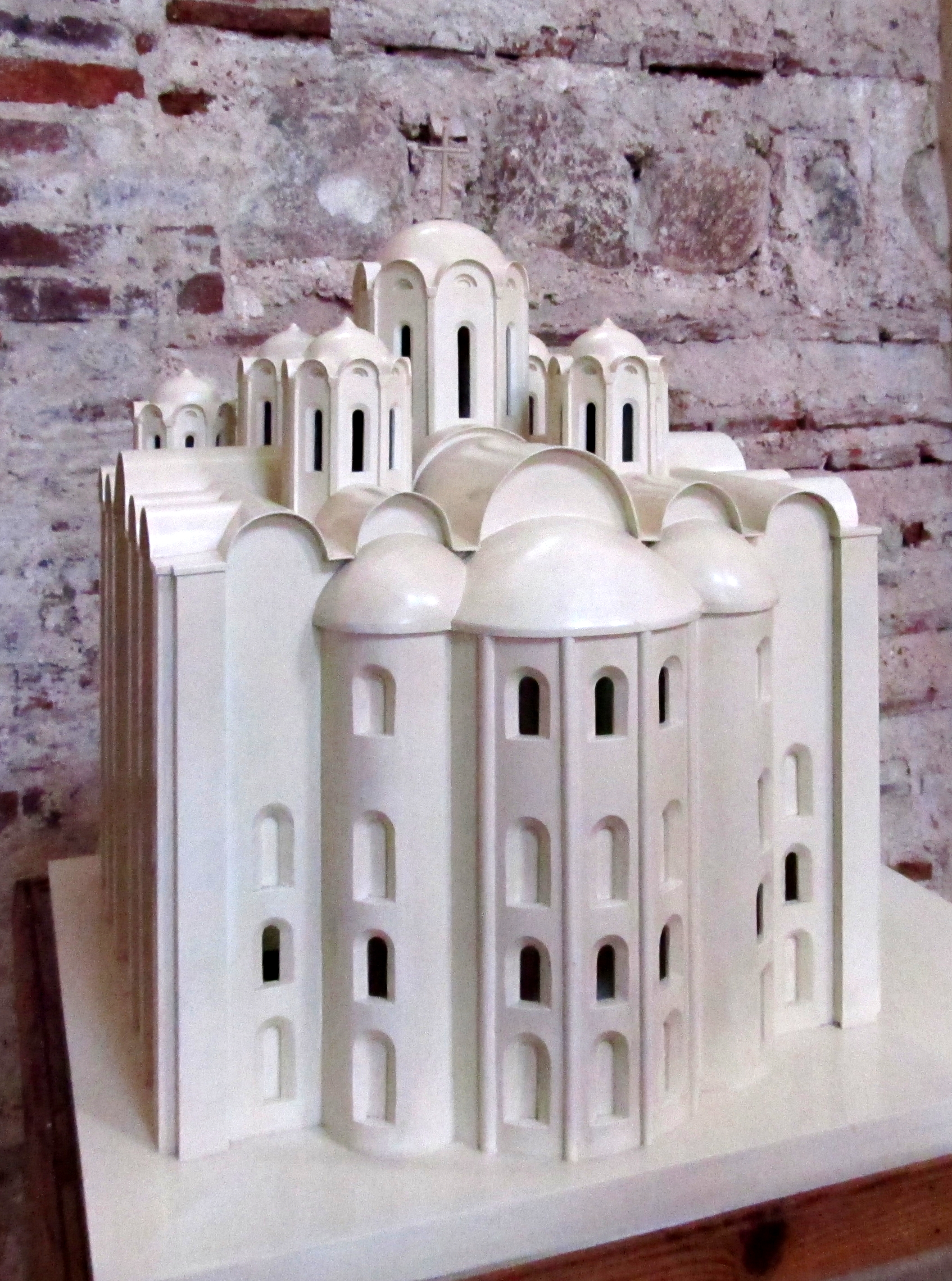 Беларуская (тарашкевіца): Сафійскі сабор. г. Полацак This is a photo of Belarusian heritage monument. Reference number: 210Г000606 ( WLM)